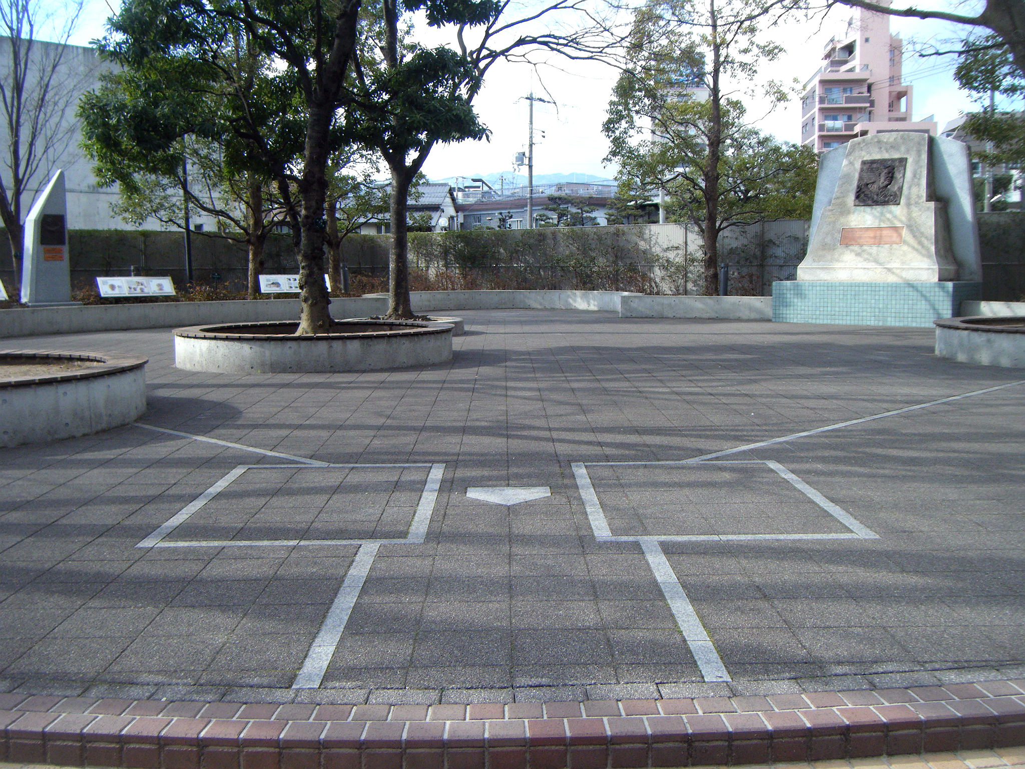 阪神甲子園球場 ミズノスクエア